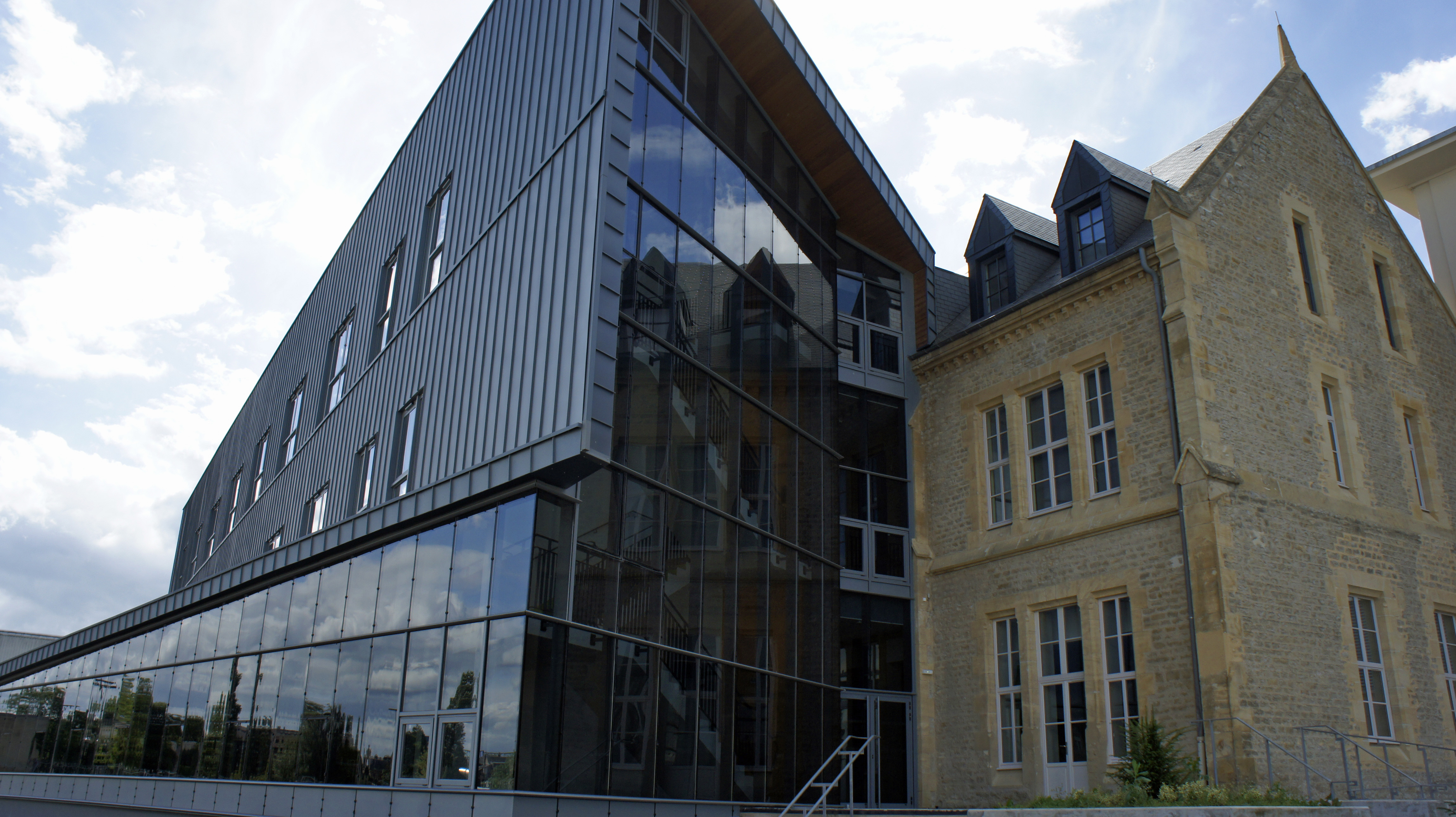 Lycée J-B Clément à Sedan.